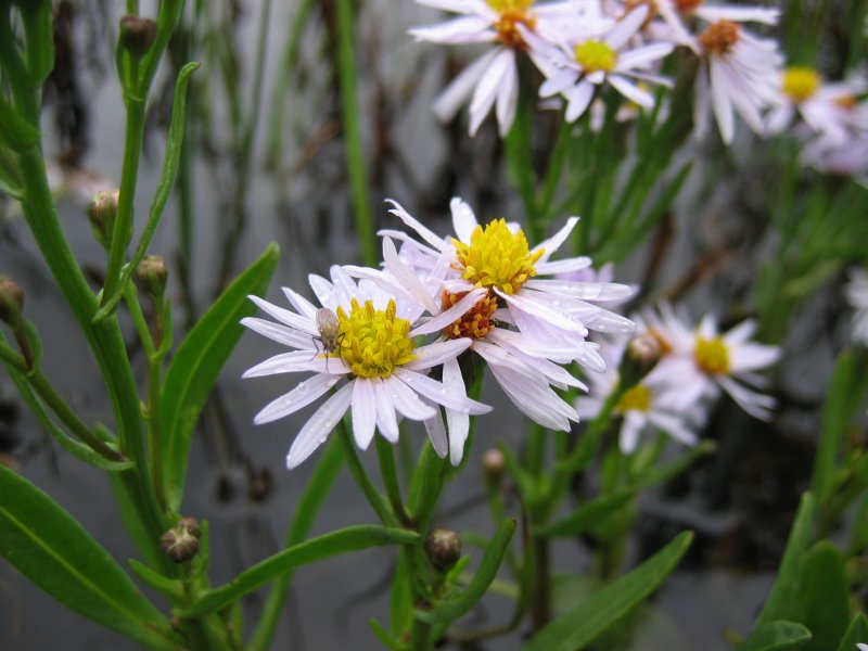 Strand-Aster Aster tripolium, Wismarbucht